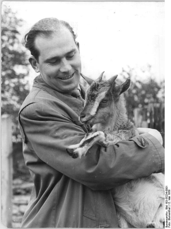 Erfurt, Tierpark Zentralbild Blumenthal 12.5.1958 Qua-Hoa. Die ersten Tiere für den künftigen Erfurter Tierpark sind in Erfurt eingetroffen. Aus der Sowjetunion, aus den Tierparks in Berlin, Dresden, und Rostock sind die ersten Tiere in Erfurt eingetroffen, die den Anfang zum künftigen Erfurter Tierpark bilden sollen, der z.Zt. am Roten Berg entsteht. In provisorischen Gehegen werden die Tiere Anfang Juni erstmalig dort gezeigt. Der Direktor Dr. Harald Roth hofft aber, daß mit Hilfe der Erfurter Bevölkerung, besonders der Erfurter Jugend im NAW bald aus dem Provisorium der Tierpark immer größer und schöner wird. UBz: Tierparkdirektor Harald Roth mit einer Zwergziege.